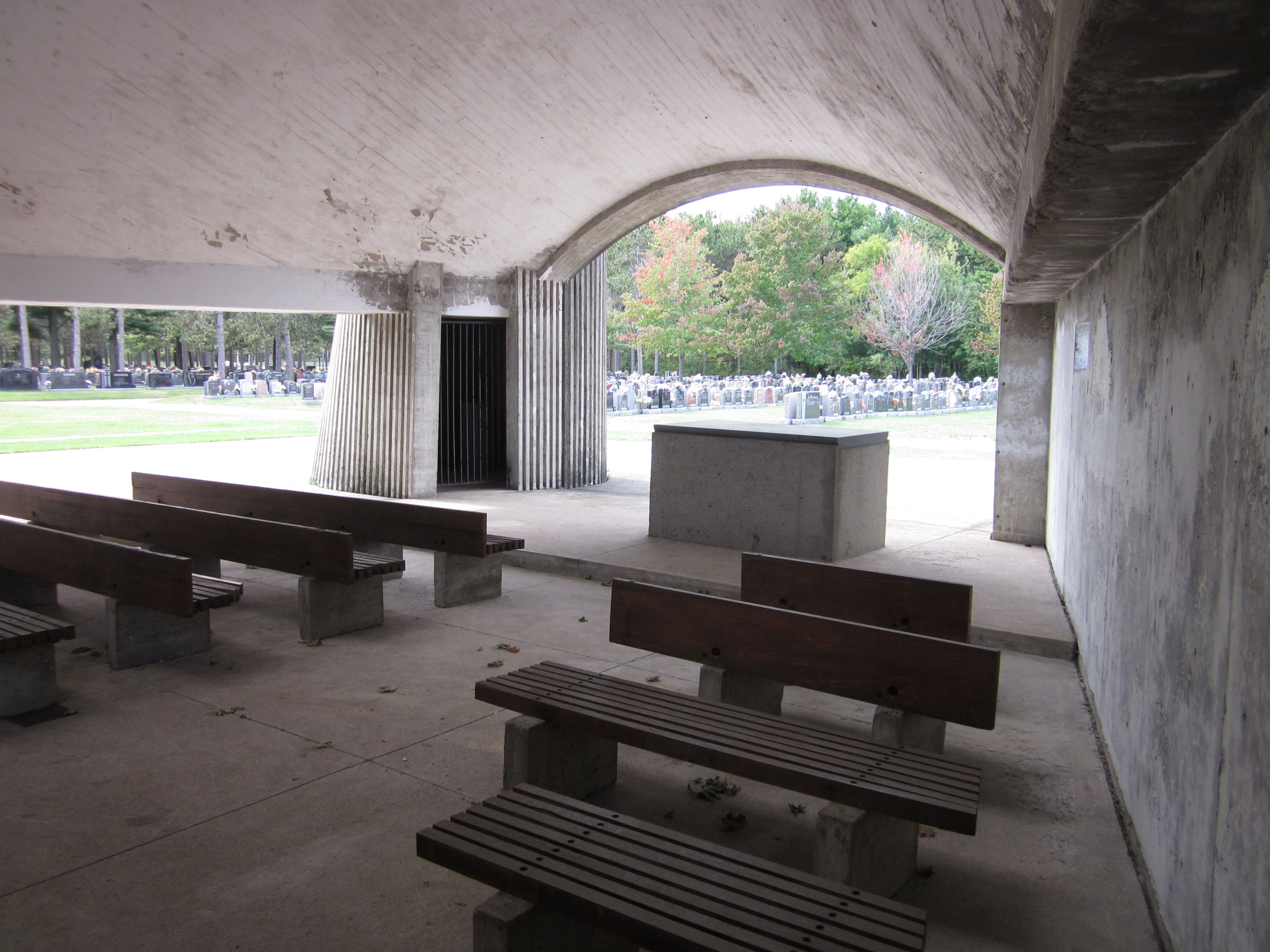 Mausolée des Évêques-de-Trois-Rivières, 3400, boulevard des Forges, Trois-Rivières (Québec, Canada). (Protection MH classé. Voir la liste des lieux patrimoniaux de la Mauricie pour plus de détails).